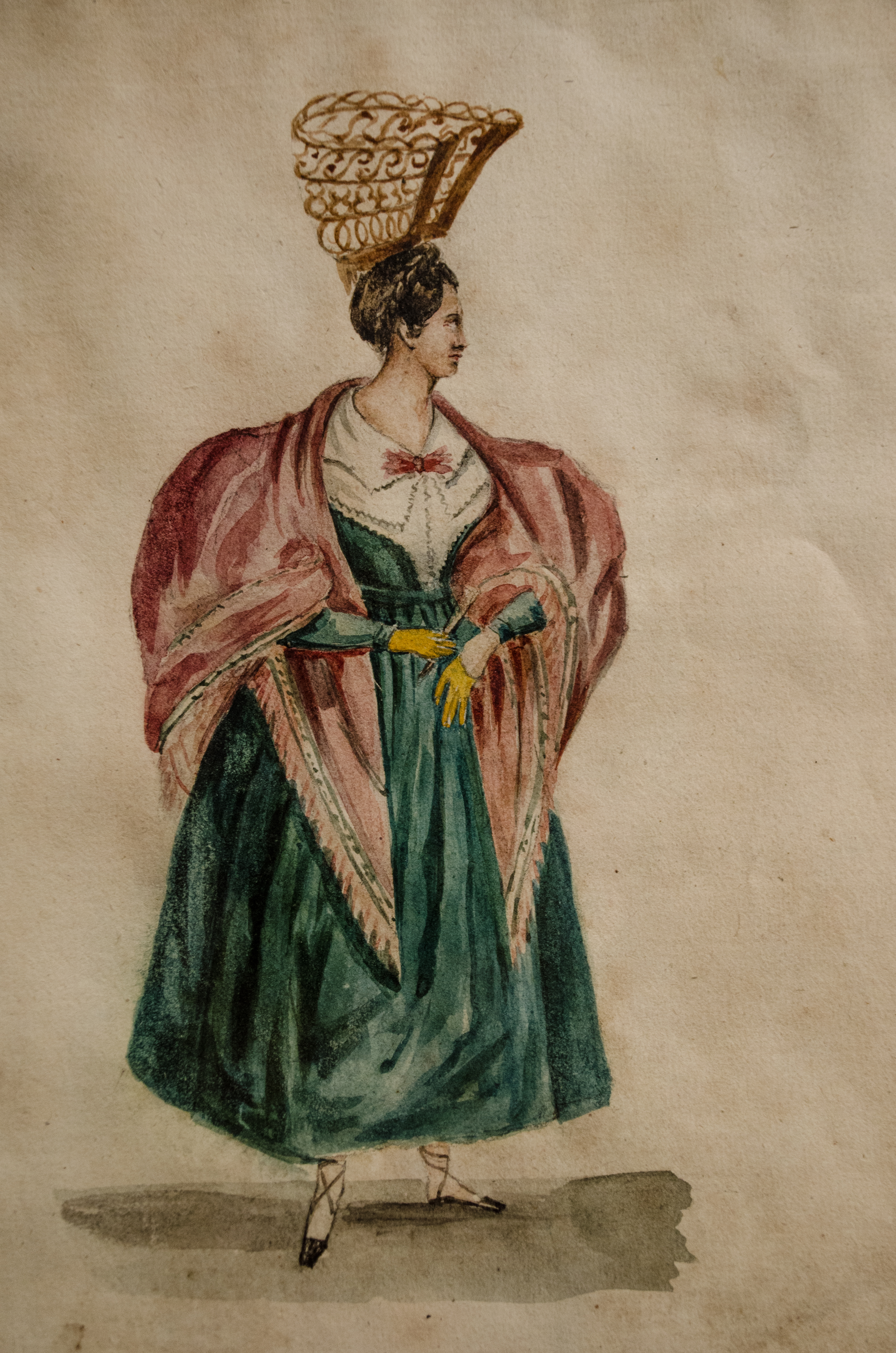 Acuarela pintada por el ingeniero hidrográfico francés Benoît Darondeau (1805-1869) durante su pasaje por Montevideo a bordo de la expedición "La Bonite" (1836-1837). Fotografía de la obra tomada por Carlos Iglesias.